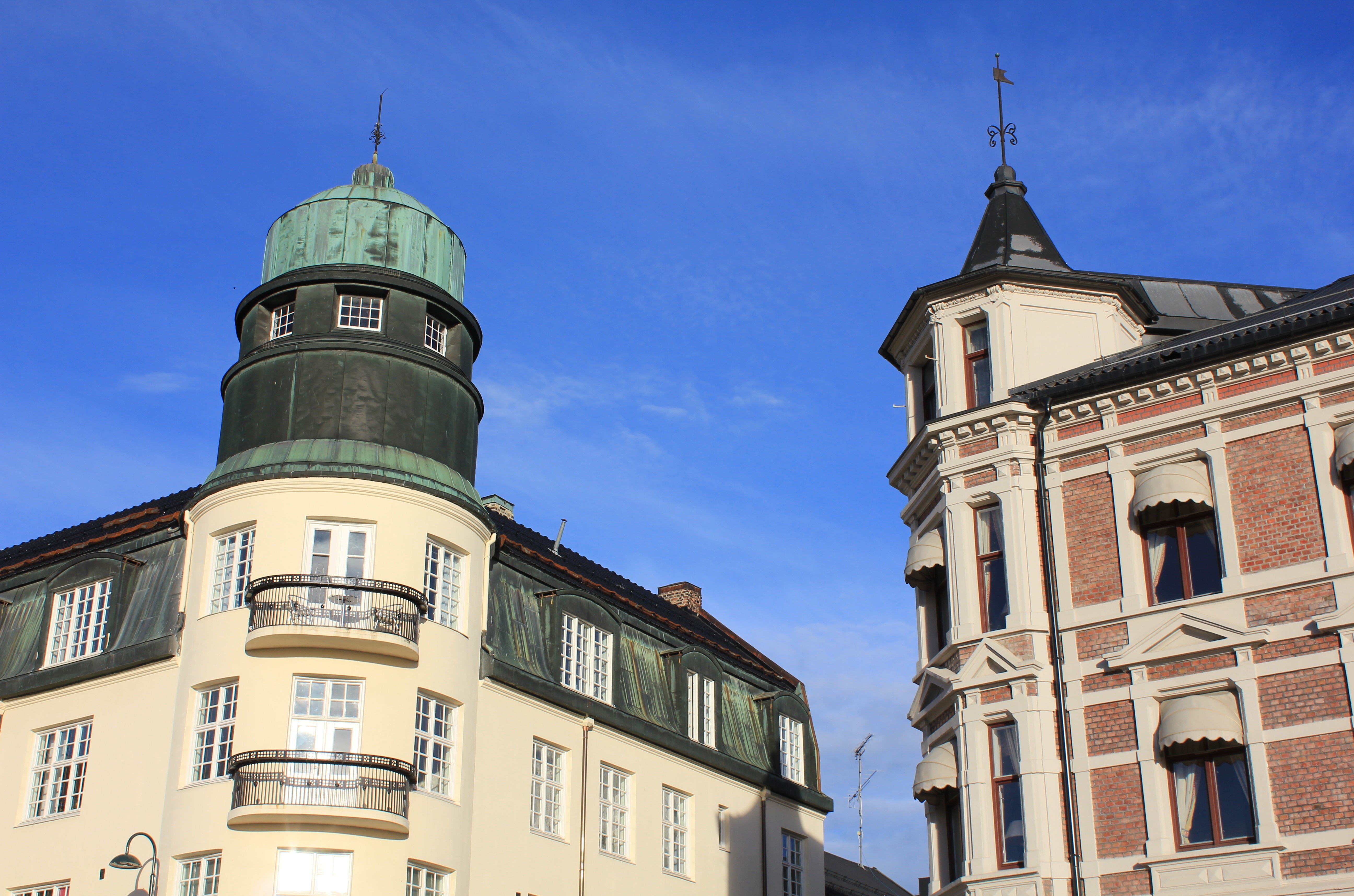 Tårnbygningene ved Trondhjemsvegen i Gjøvik.